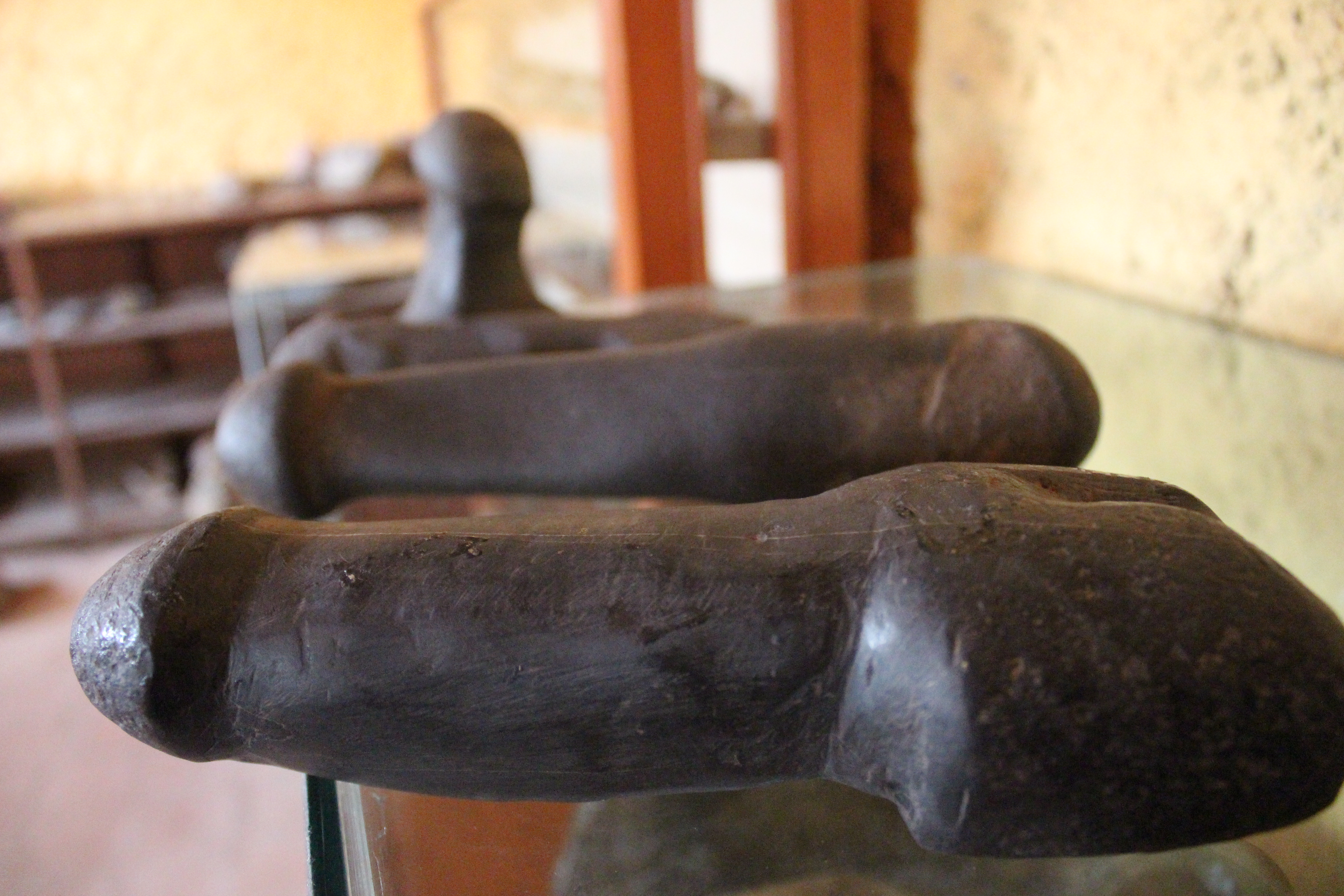 el distrito de Pachiza,provicnia de Mariscal Caceres,region San Martin-PERU,cuenta con un museo,donde exhibe pizas y restos arqueoligcas y coloniales de los primeos pobladores del valle del rio huayabamba,en ella sxhibe 20 piezas sexuales,llamados falos,posiblementre la etnia selvatica de los hibitos veneraban la fertilidad y sexualidad por medio dee estos falos,y posible influencia chachapoina del gran pajaten